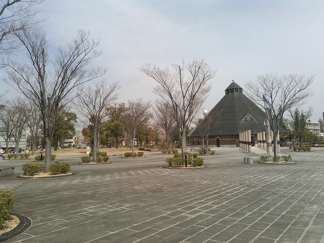 Basa Jawa: 郡山市 21世紀記念公園麓山の杜